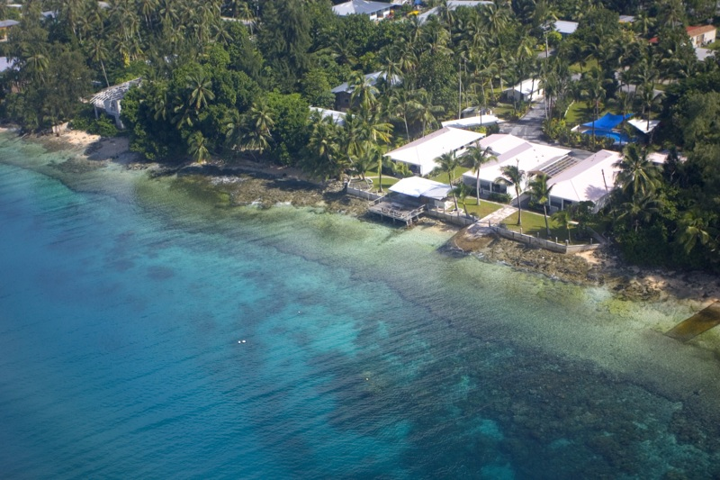 majuro Marshall Islands